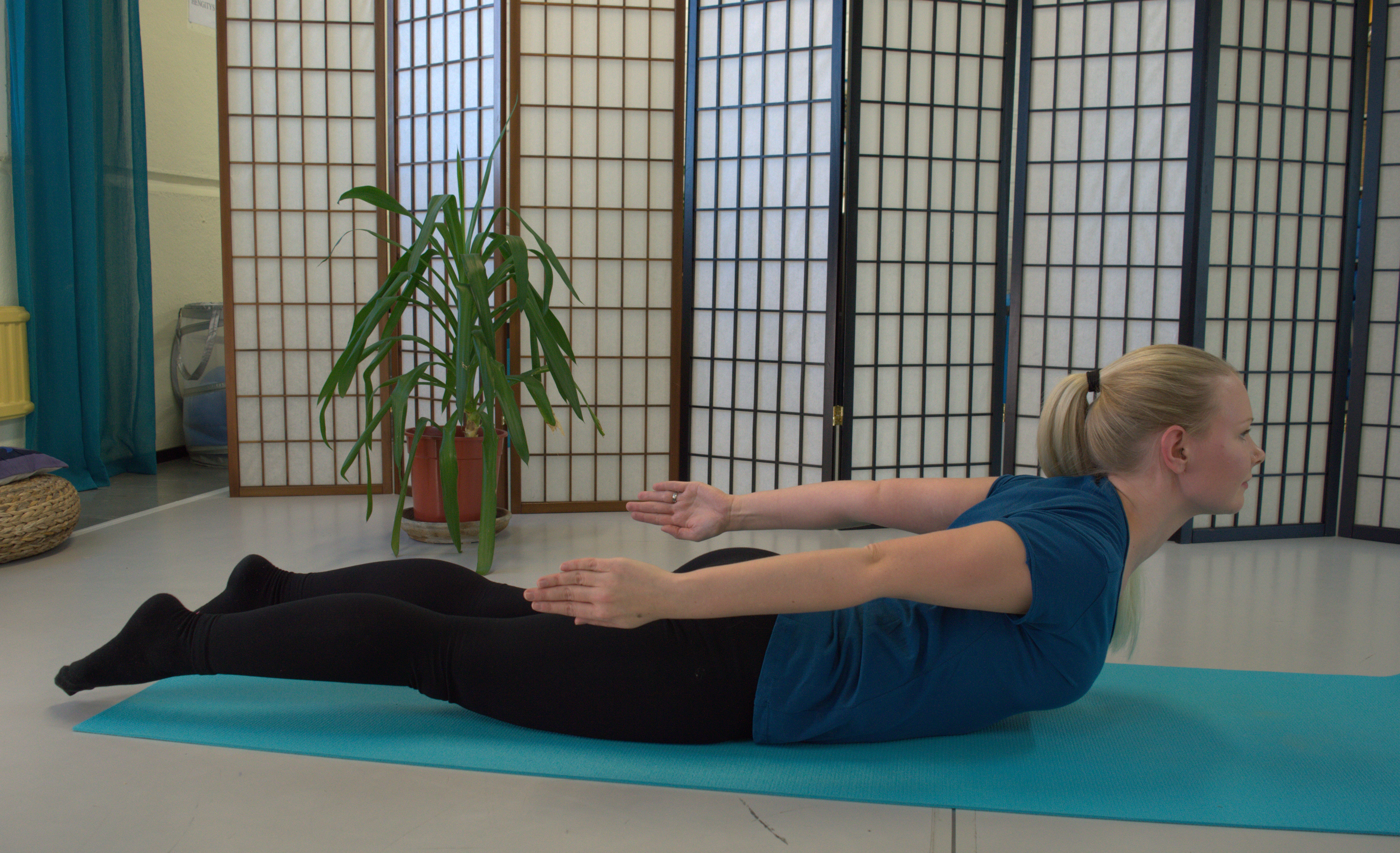 Pilatesliikkeet selän nosto